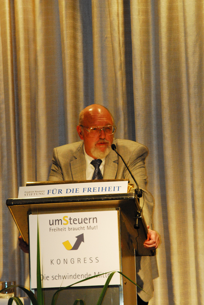 Rede von Prof Kersting auf dem Kongress "Die Schwindende Mitte" der Friedrich Naumann Stiftung für die Freiheit im Rahmen der Stiftungsinitiative Umsteuern - Freiheit braucht Mut, Köln 17.August 2009